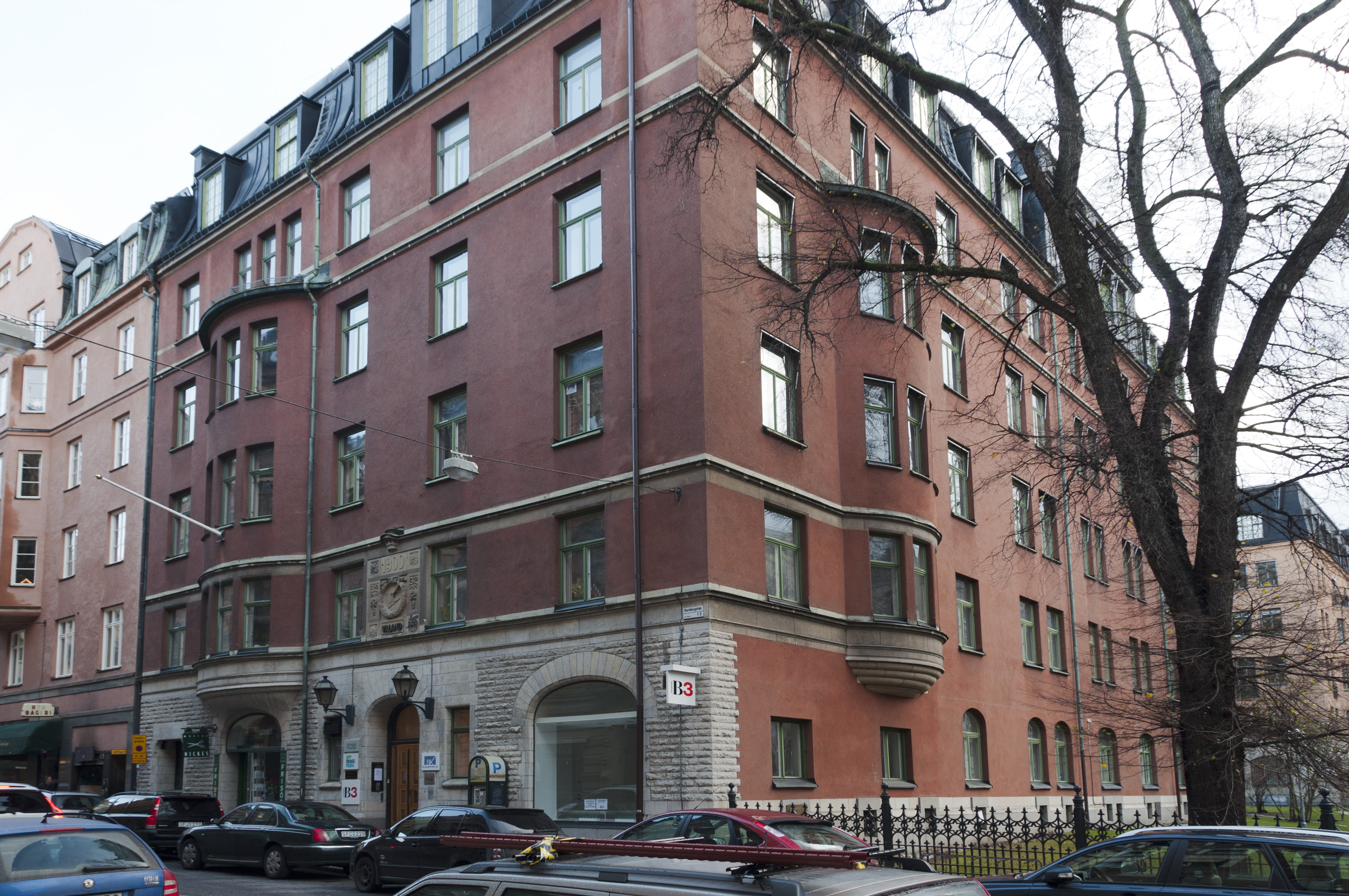 Fenix 1, Barnhusgatan 1, Byggnadsår 1900-02, arkitekt Gustaf Detthoff, byggherre J A Johansson, byggmästare N L Lundberg